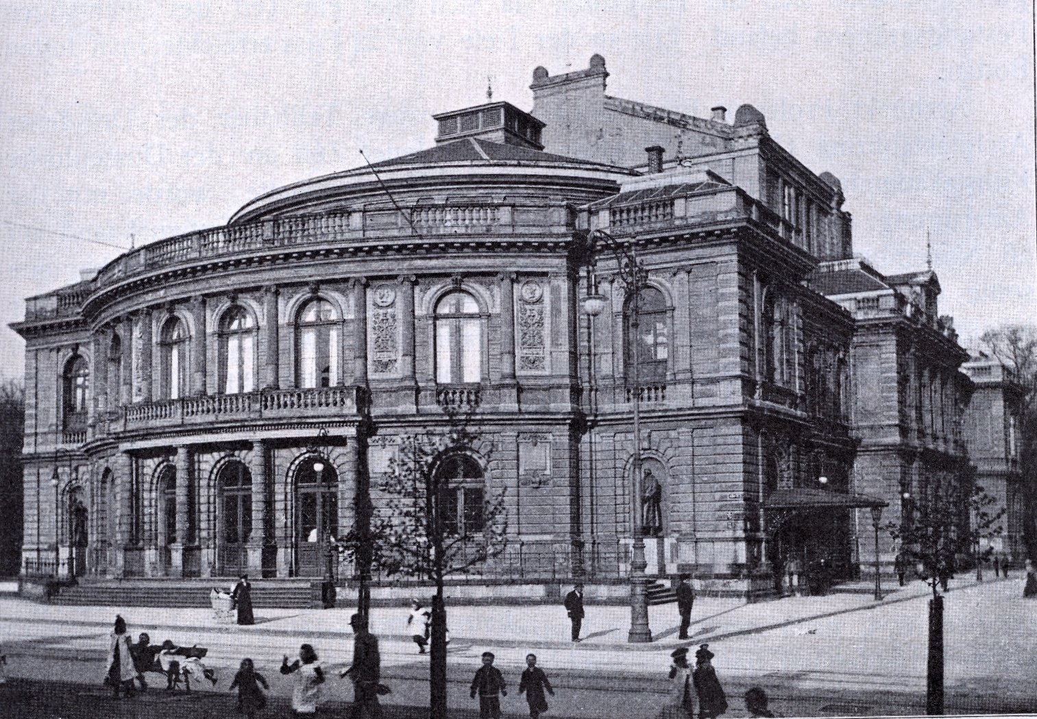 Düsseldorf, Stadttheater und späteres Opernhaus an der Alleenstraße, Außenansicht, erbaut von Giese von 1873 bis 1875.jpg